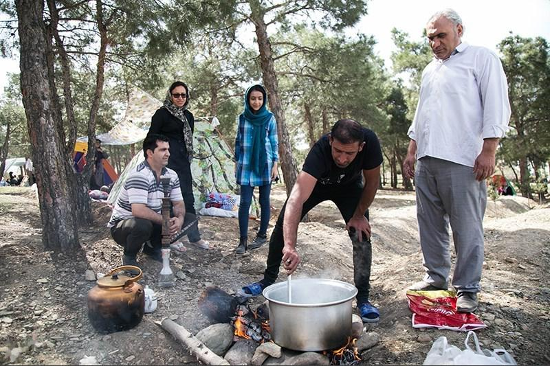 People in Iran Celebrate Nature Day - TEHRAN (Tasnim) - Iranian people spent a day outside their homes on Monday to celebrate the Nature Day (also known as Sizdah Bedar).